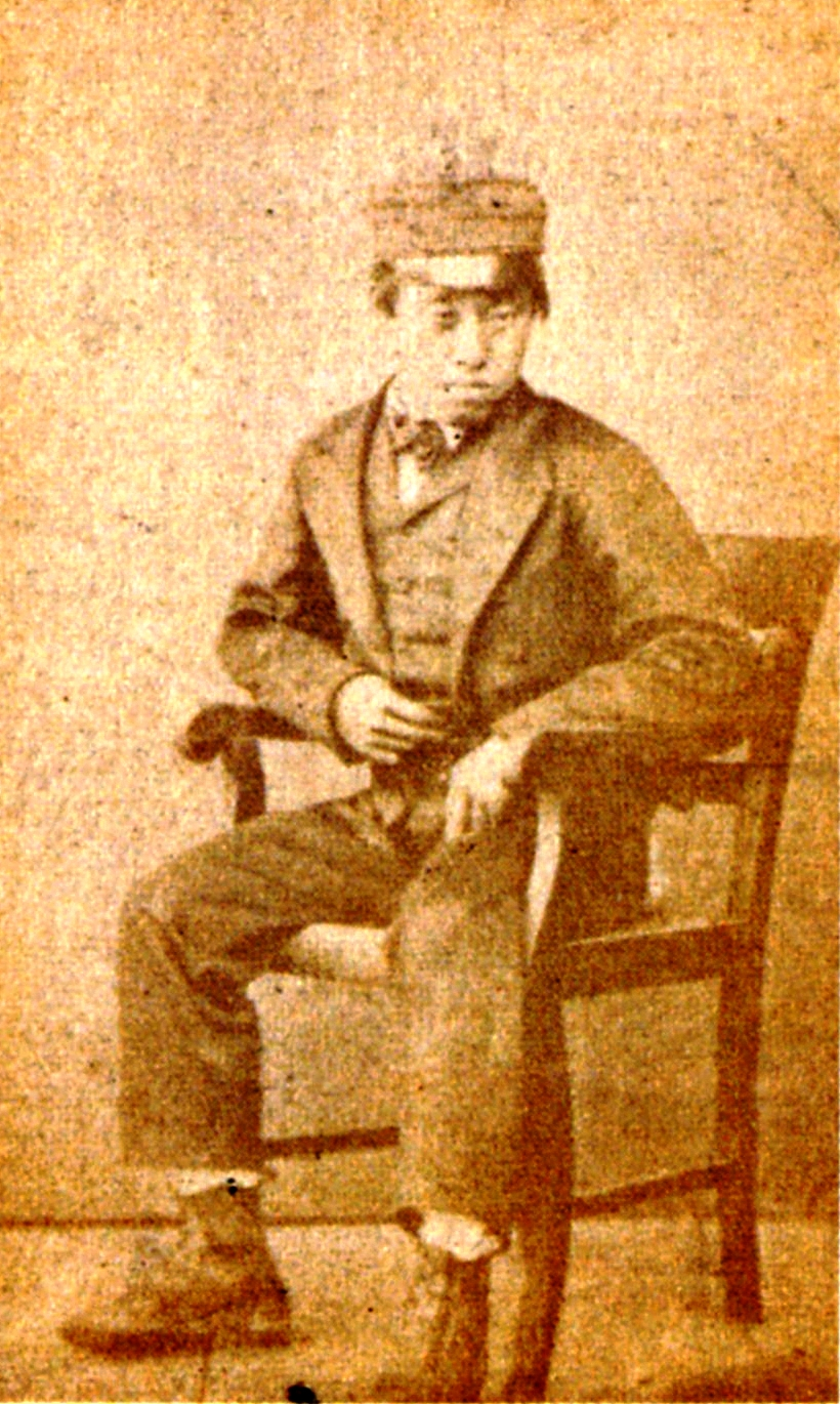 長崎にて撮影された海援隊士・沢村惣之丞の写真。